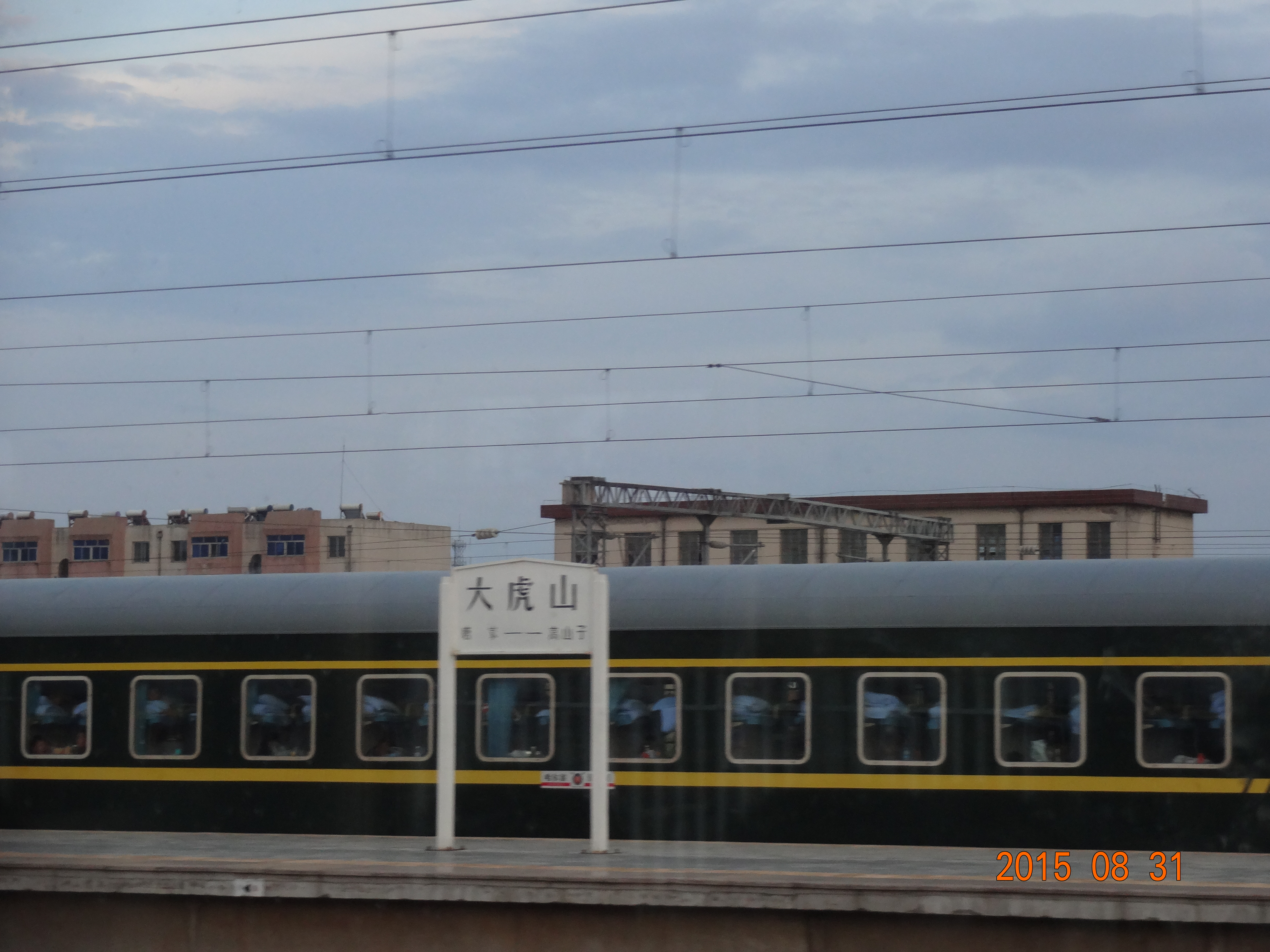 大虎山站